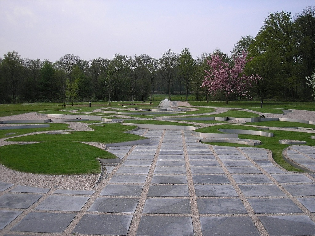 Tuin van Bezinning; Aanzicht middenvoor (hoog). Nationaal monument ter ere van tijdens de uitoefening van de dienst overleden Nederlandse politiemensen. Locatie: Achter koetshuis van Huis 't Velde te Warnsveld (NL) Foto: Pudding4brains, 5 mei 2006 - Volledig vrijelijk te gebruiken ('Publiek Domein') Categorie:Afbeelding Tuin van Bezinning